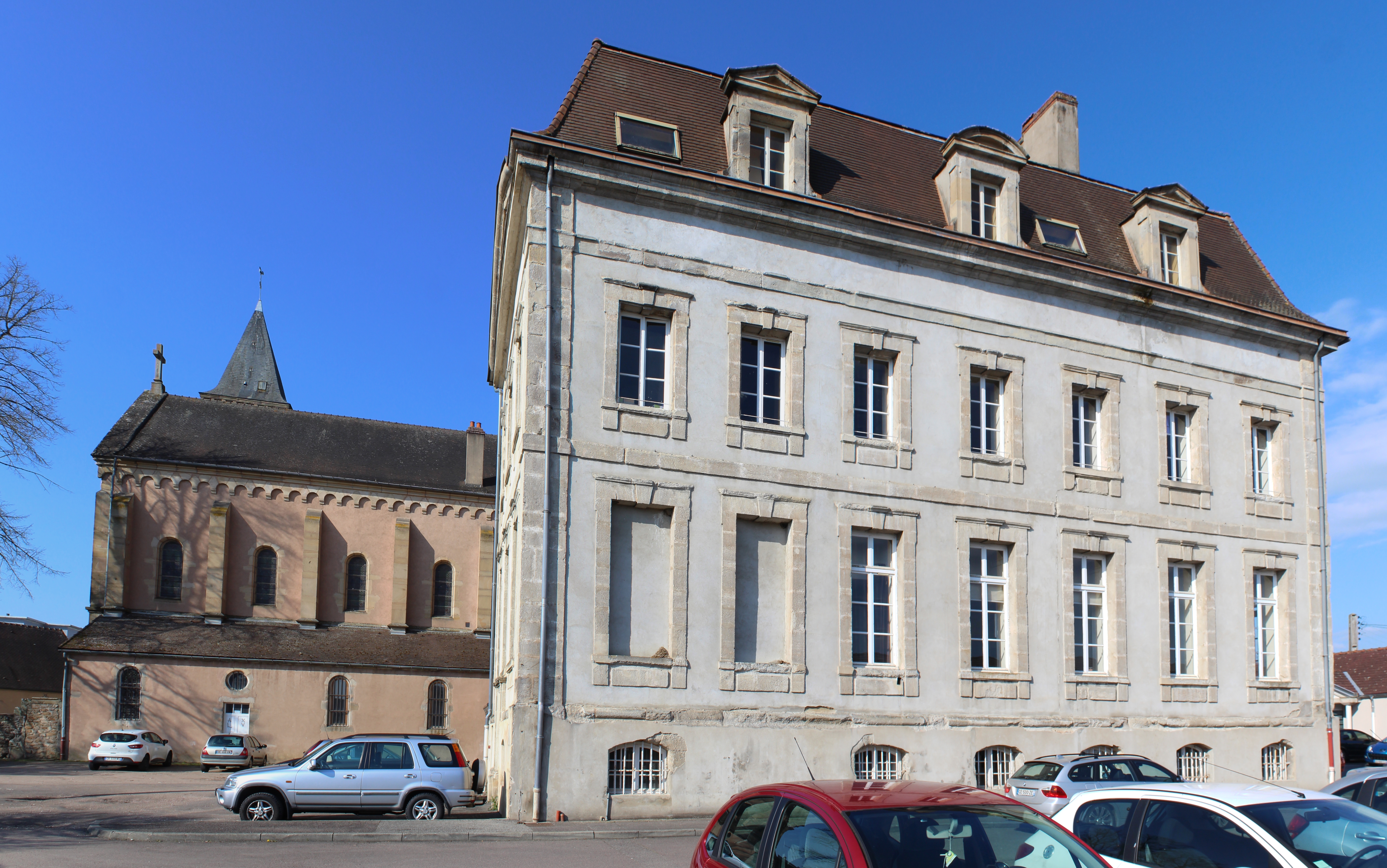 Abbaye Saint-Jean-le-Grand d'Autun.